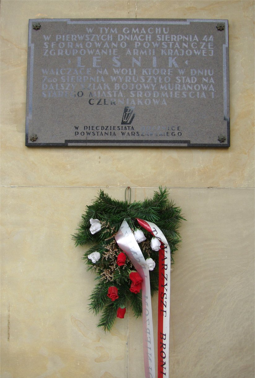 Na ścianie budynku Sądów przy ul. Solidarności w Warszawie (fot Zu)